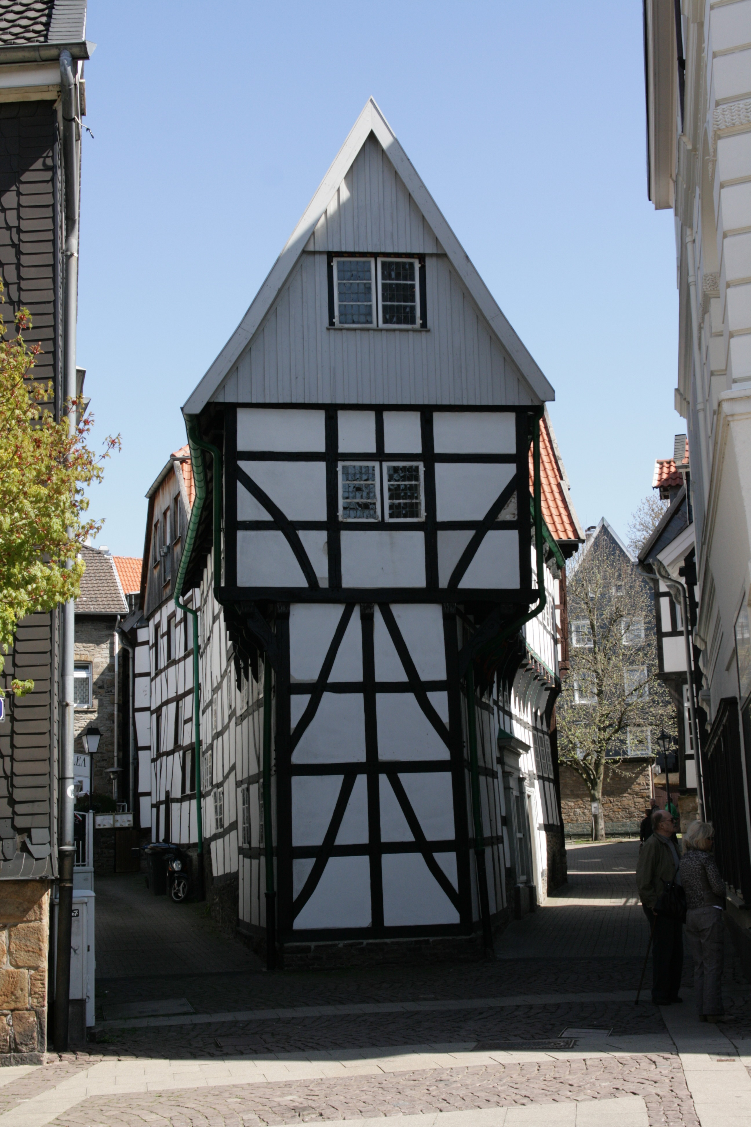 Bügeleisenhaus am Haldenplatz in Hattingen